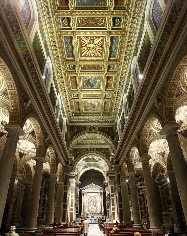 L'interno della Basilica del Sacro Cuore